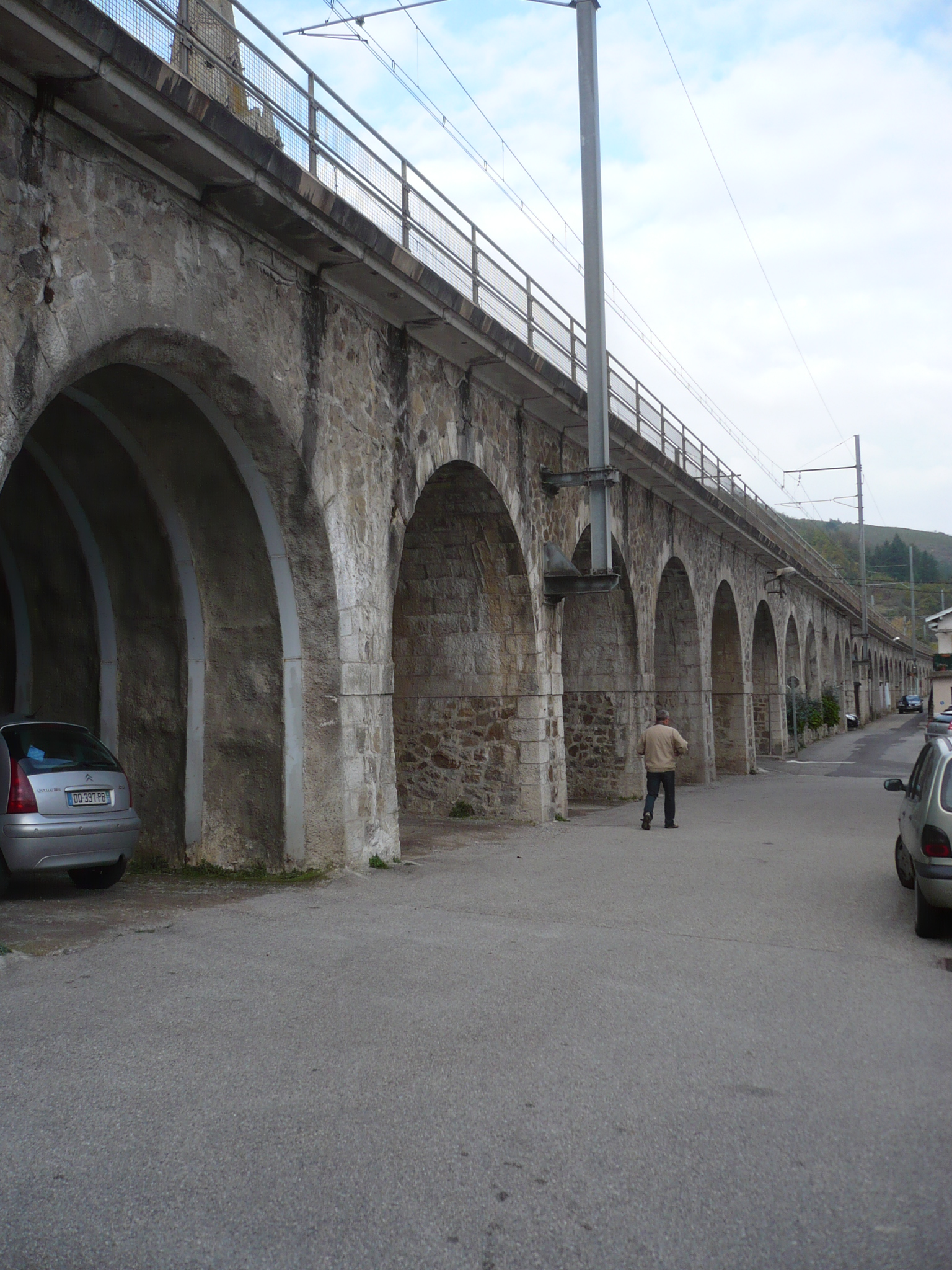 Viaduc du chemin de fer à Serrières